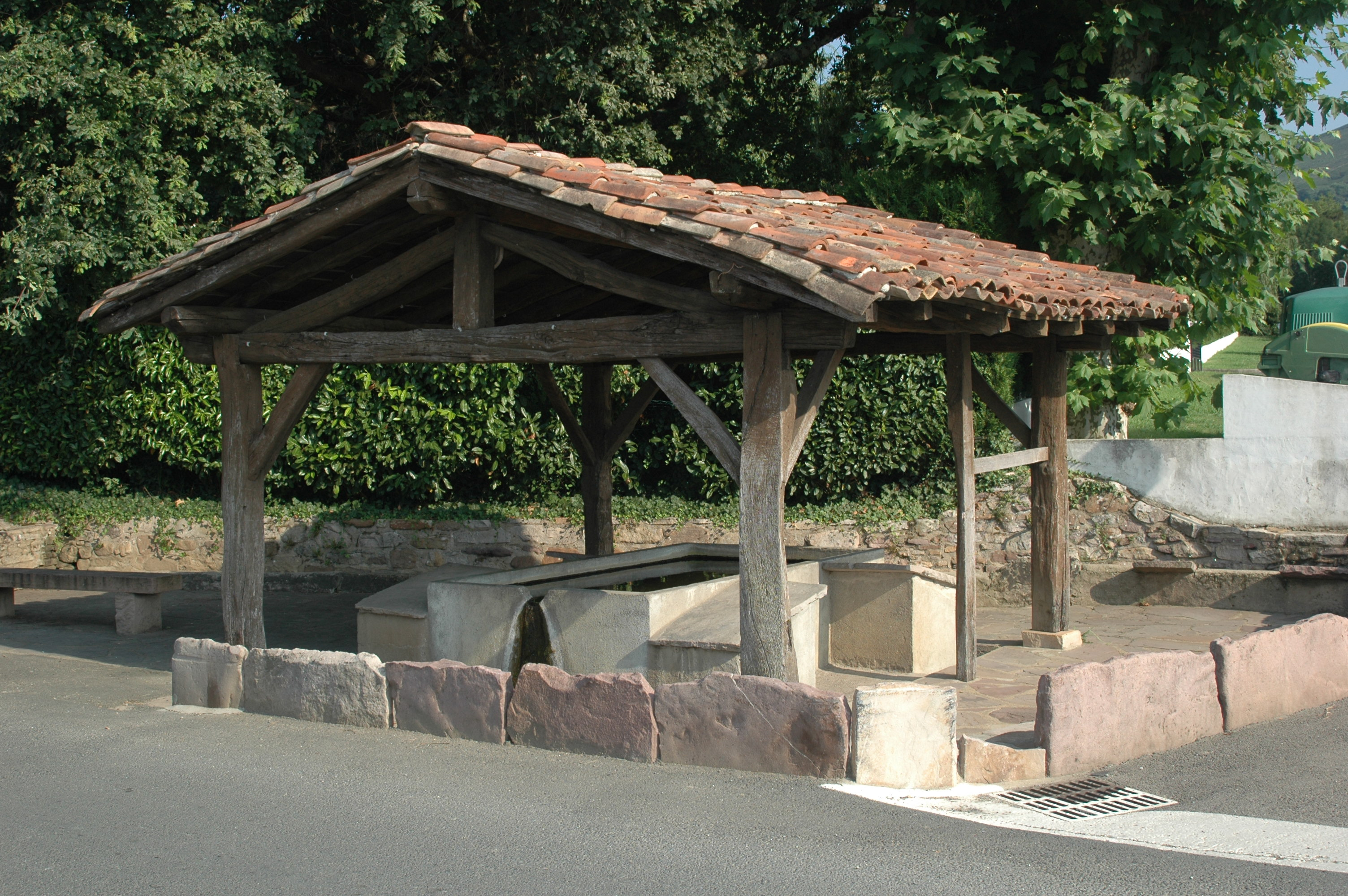 Ascain, le lavoir. Photo prise le 23/07/06 par Harrieta171